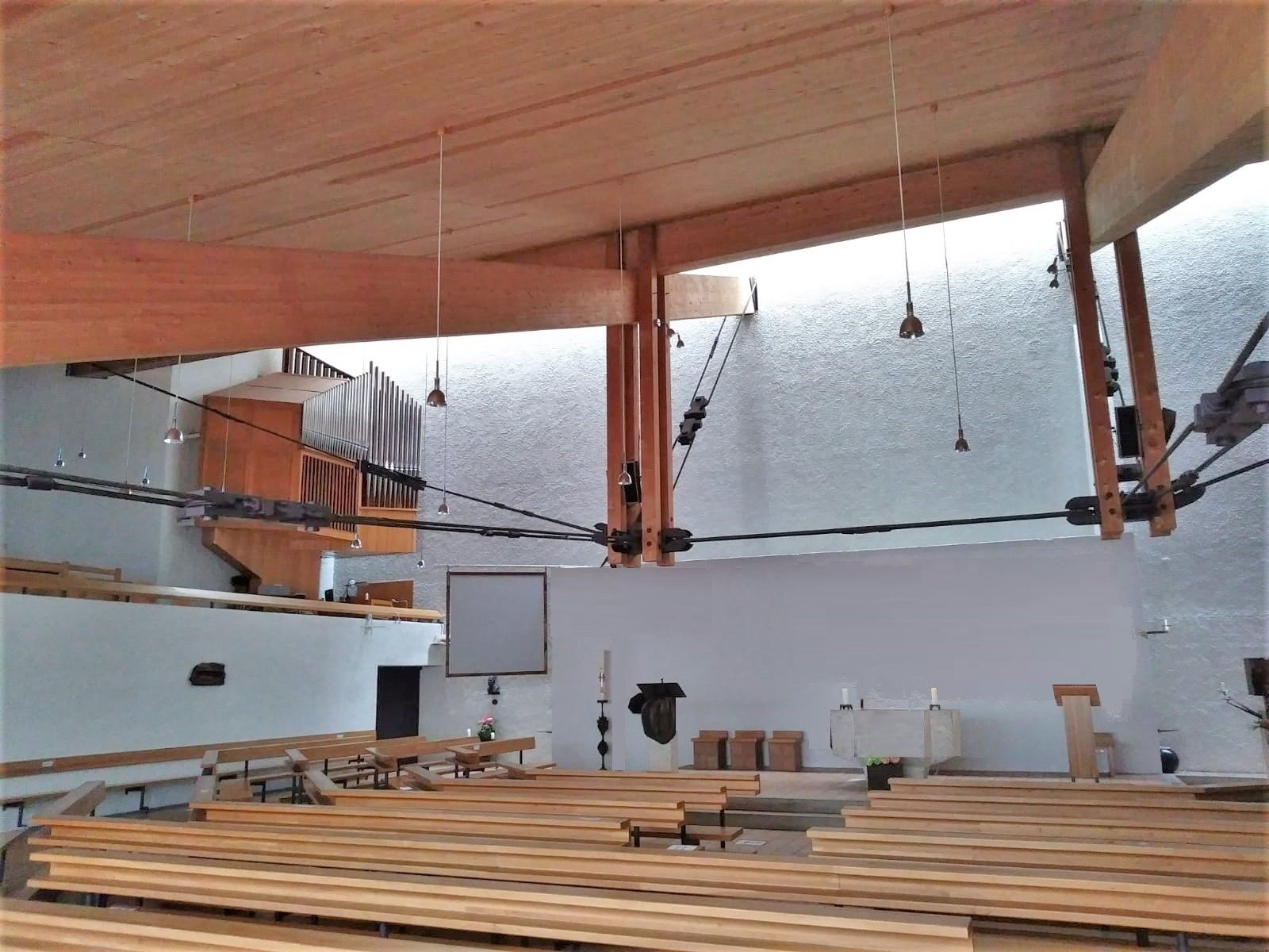 Saint Albertus Magnus Church (Ottobrunn)